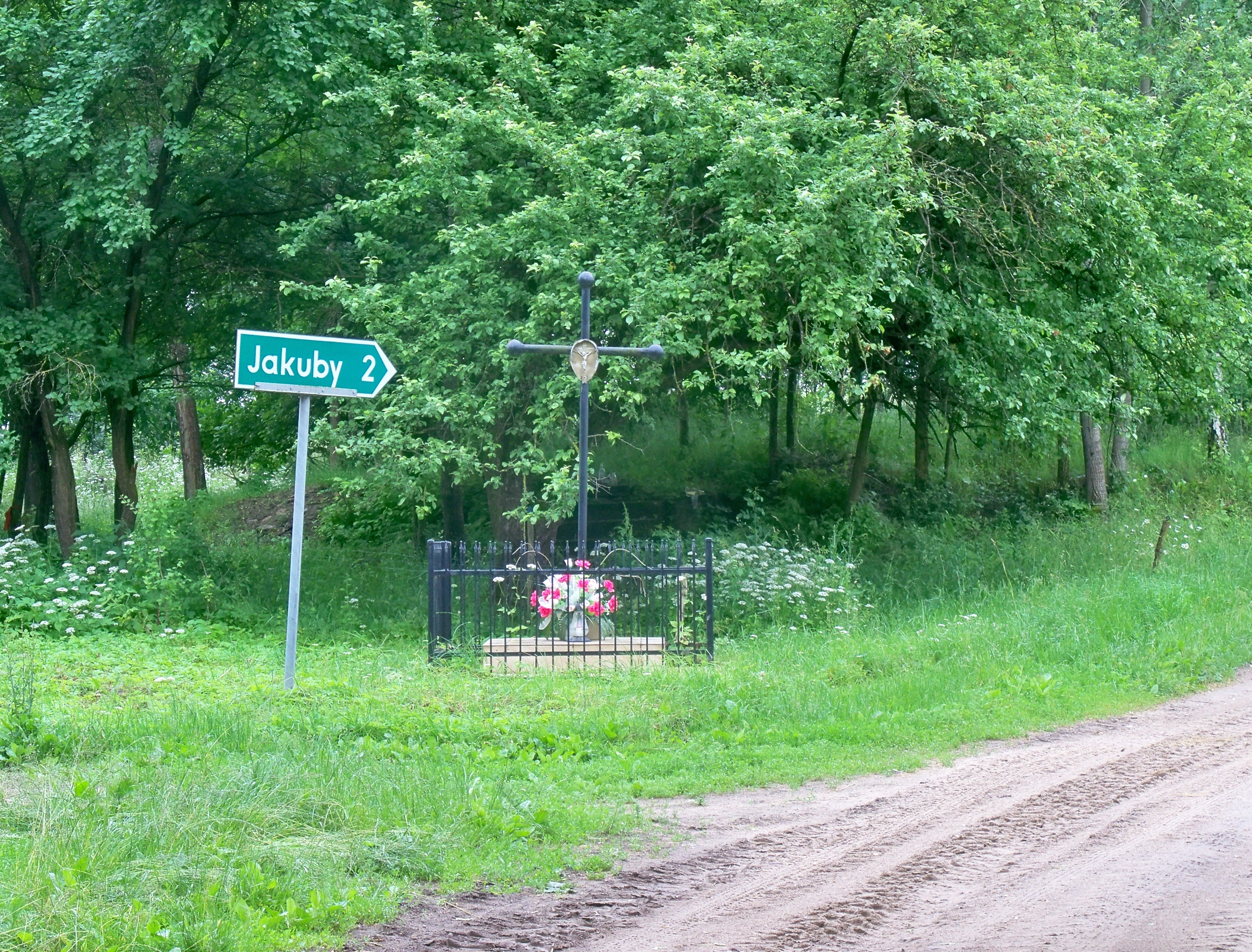 Rozstaje w Cwalinach k. Białej Piskiej